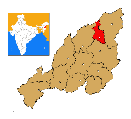 Mapa de localización del distrito